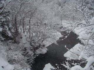 湯西川沢口ダム上